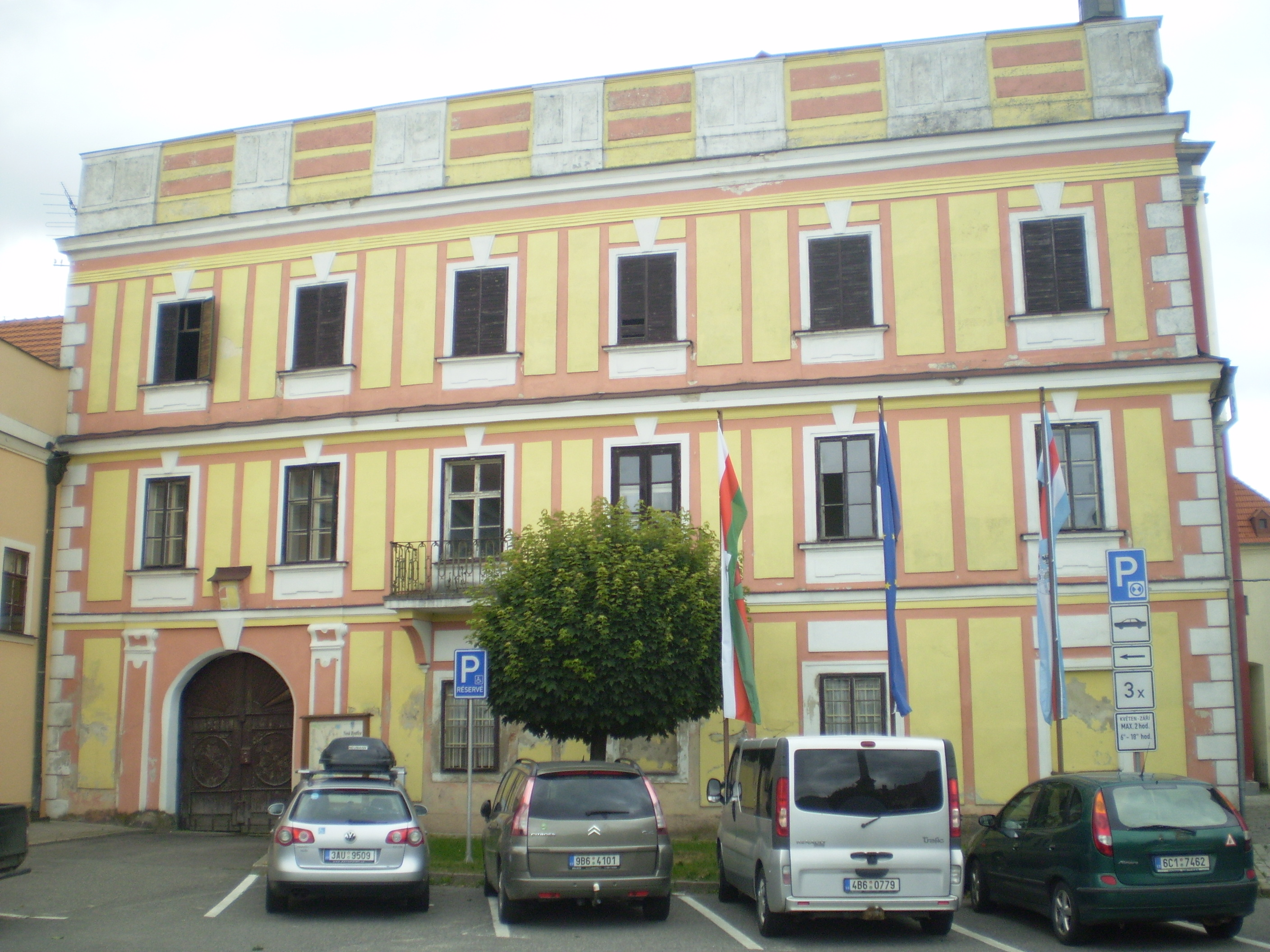 pohled z náměstí